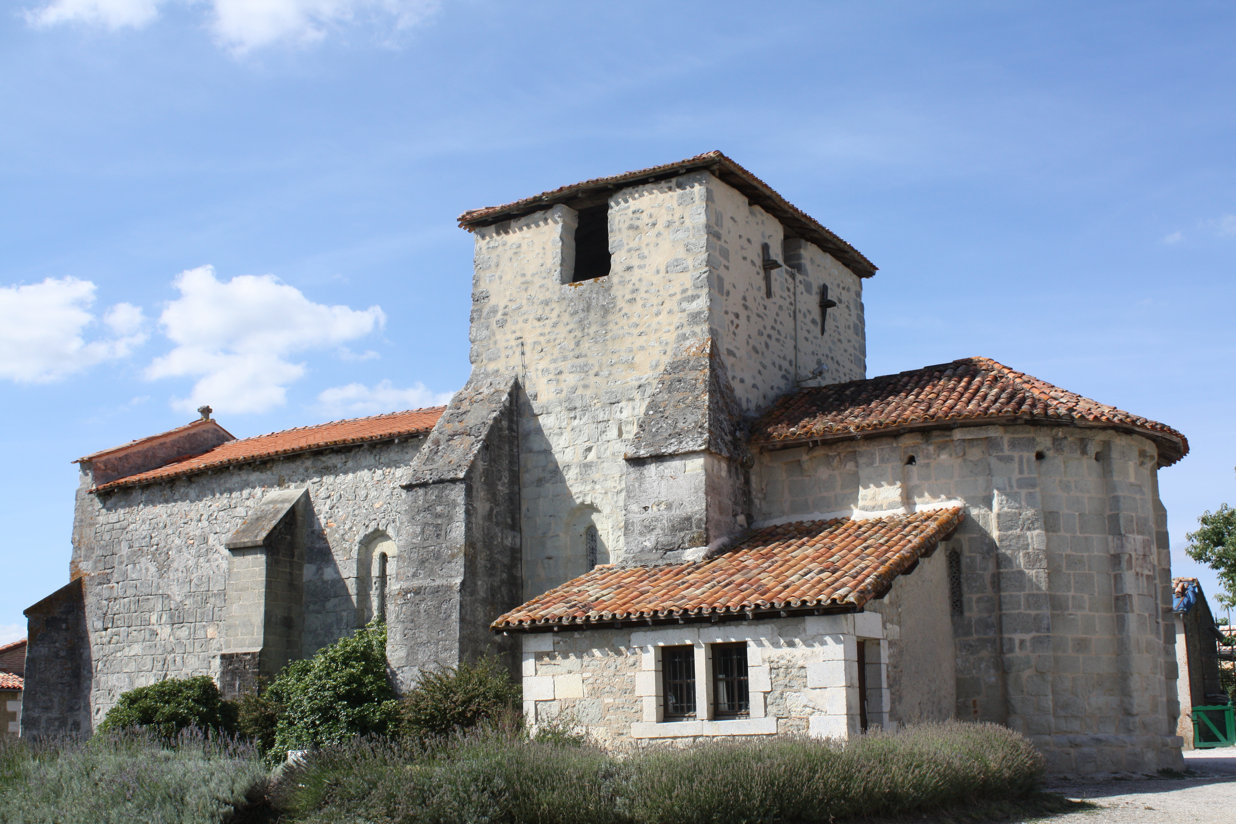 Église Saint-Antoine de La Genétouze (Inscrit) .